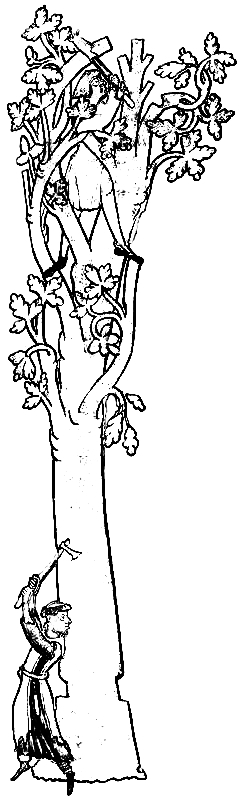 Dessin d'après manuscrit enluminé, Moralia in Job, v. 1111, bibliothèque municipale de Dijon, moine et ouvrier (convers ?) bûcherons